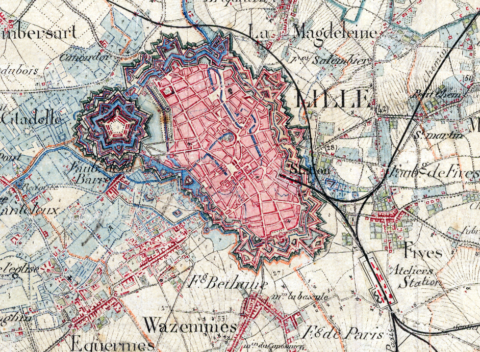 Détail carte d'état-major de Lille avec des levées de 1824 et 1825 sur lesquelles sont tracés les nouvelles lignes de chemin de fer réalisées entre 1842 et 1860.